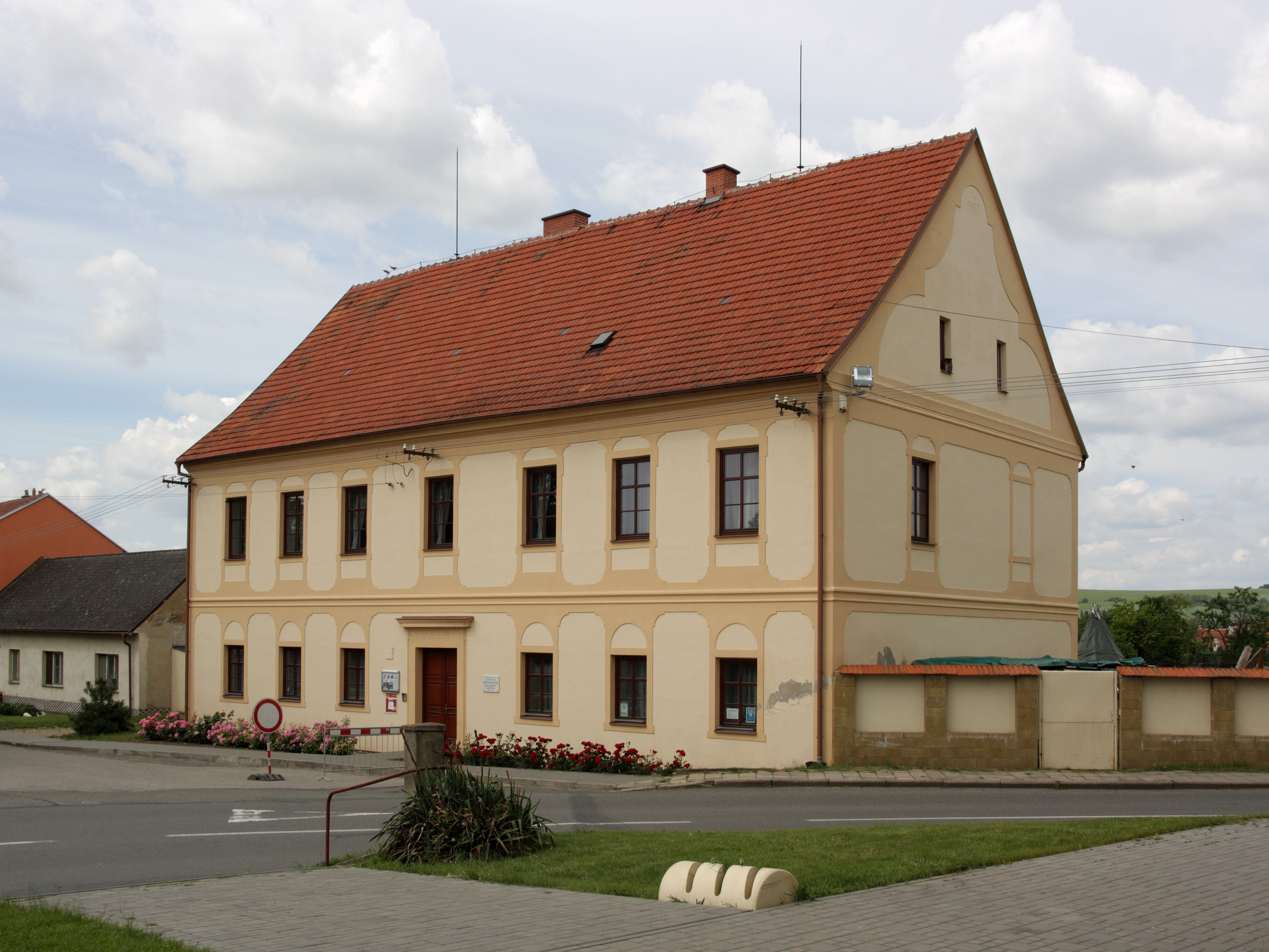 Šaratice - fara a knihovna.